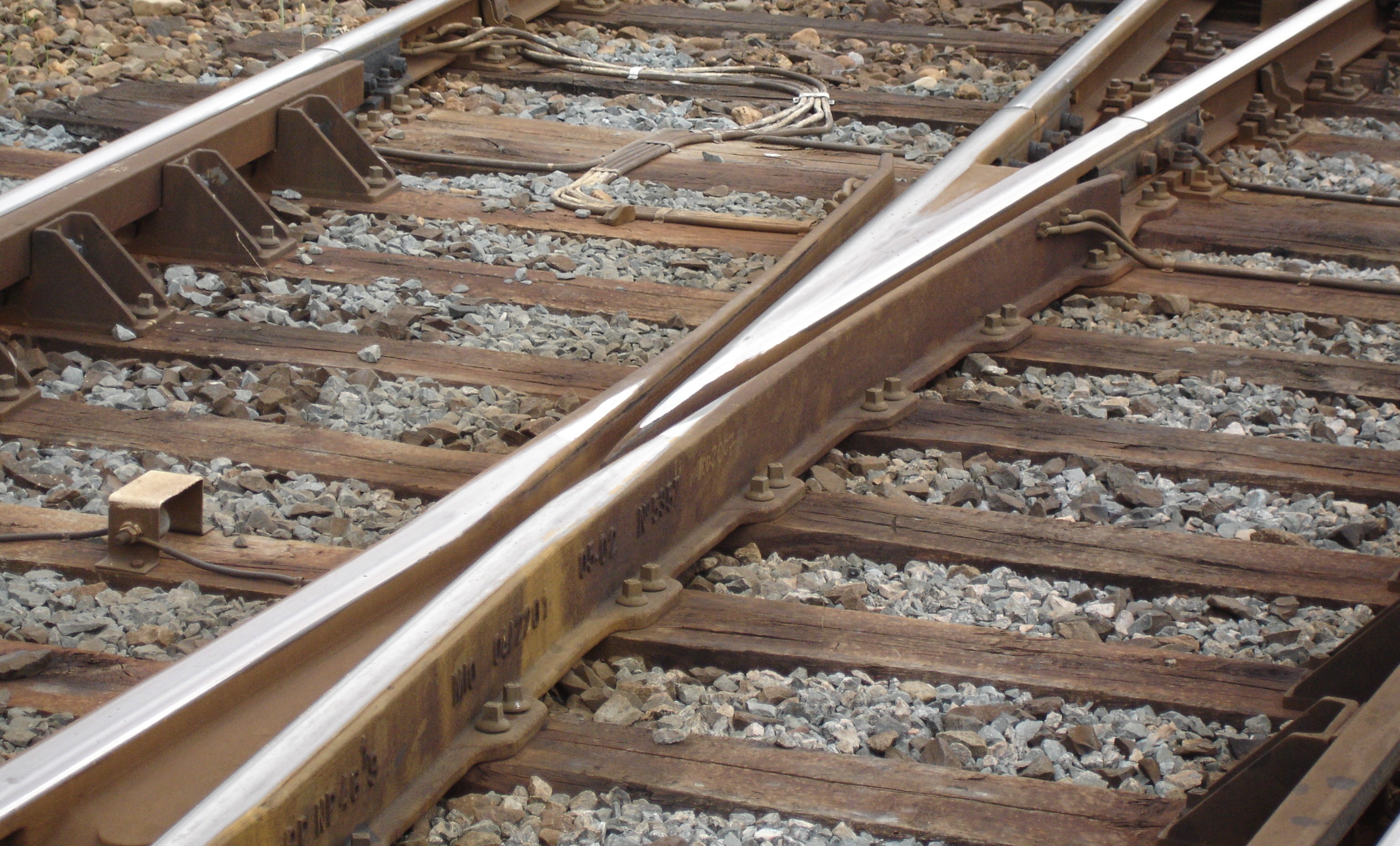 Puntstuk